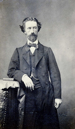 Maximiano Errázuriz Valdivieso, (Santiago, el 21 de febrero de 1832. Dejó de existir en su fundo Panquehue, San Felipe, el 17 de noviembre de 1890). Agrimensor y político conservador chileno.